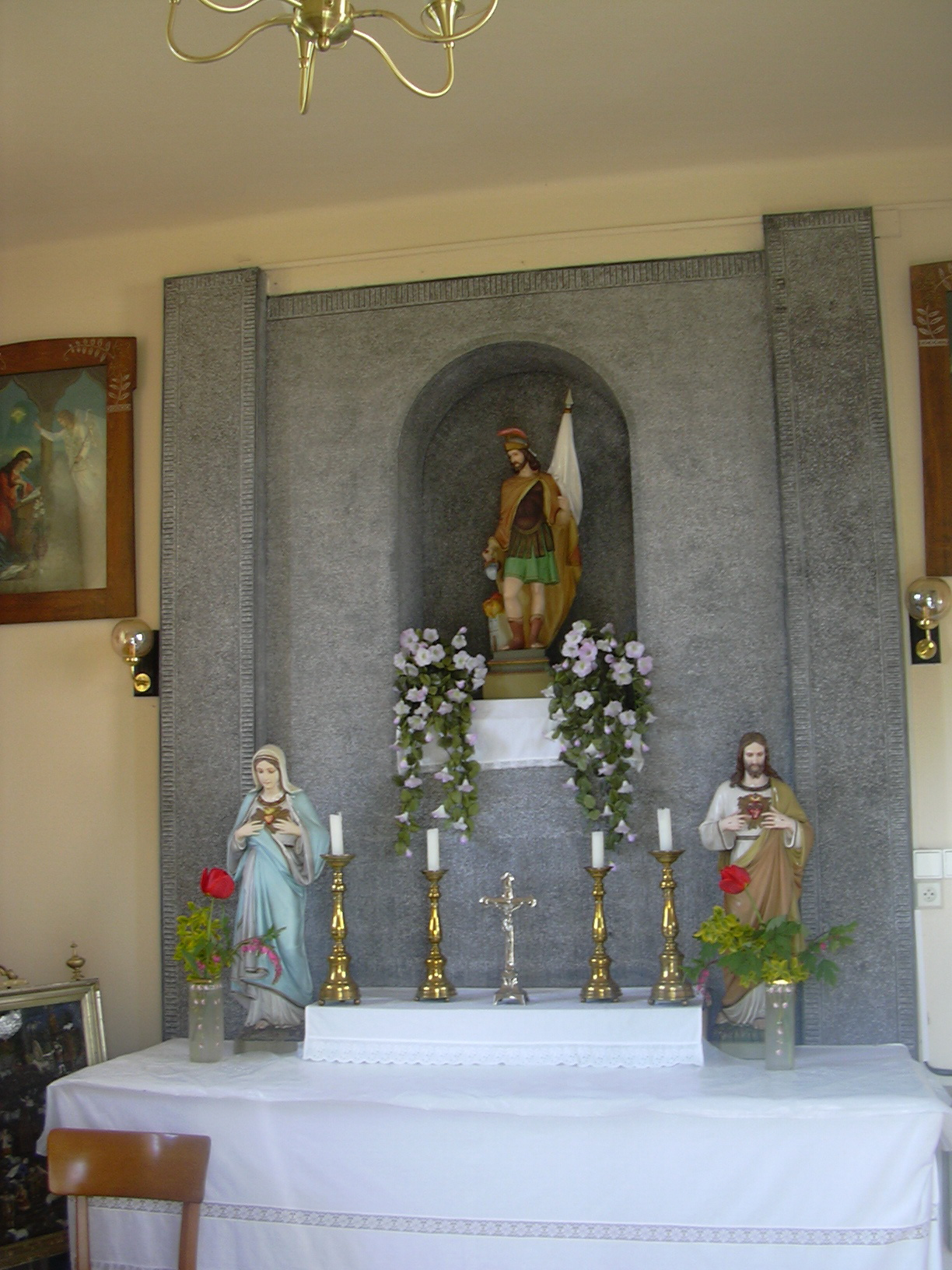 Interiér kaple sv. Floriána, Hlubočany (Vyškov District - Czech Republic)